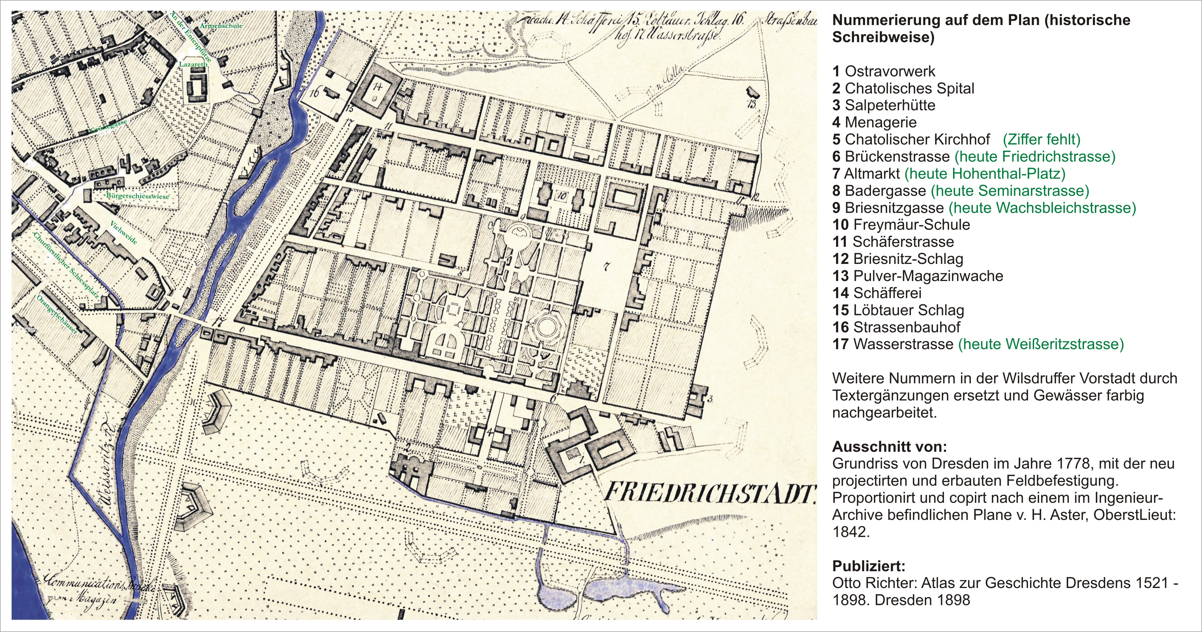 Detail eines Stadtplans von Dresden (Stand von 1778), Friedrichstadt (farbig nachbearbeitet)